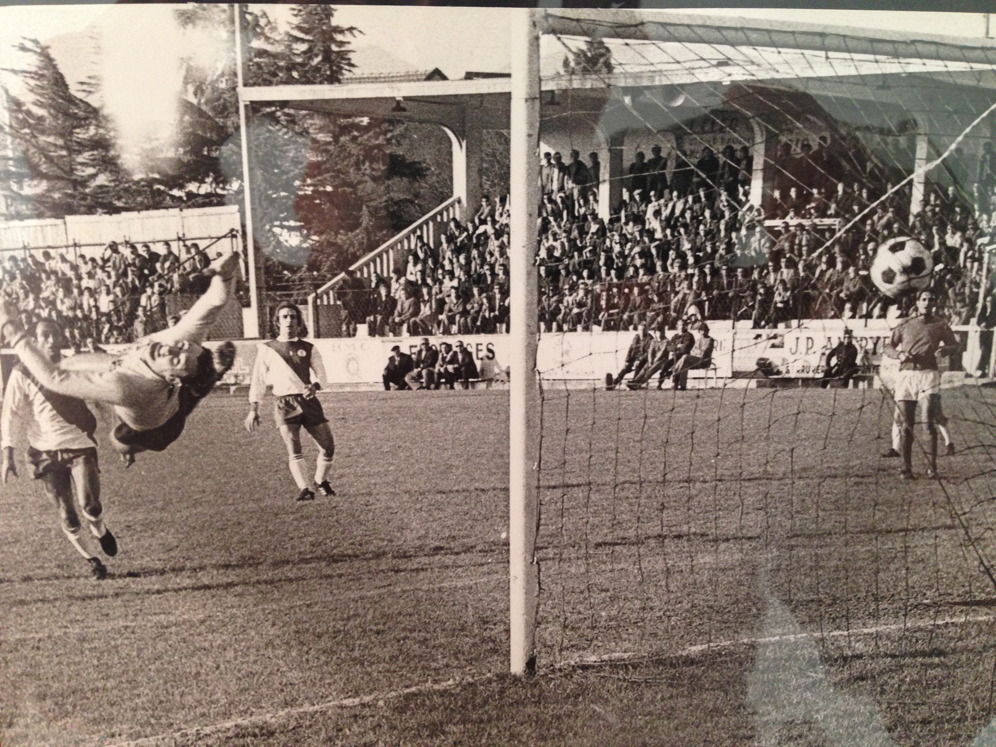 Robert Belloni au cours d'un match.